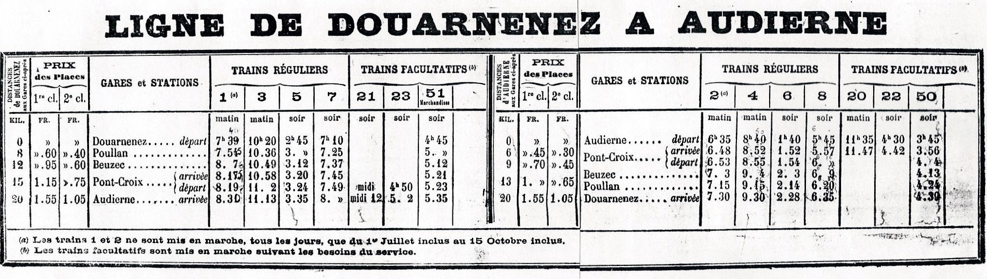 Les horaires des trains de la ligne des Chemins de fer départementaux du Finistère Douarnenez-Audierne à partir du 1er juillet 1896.